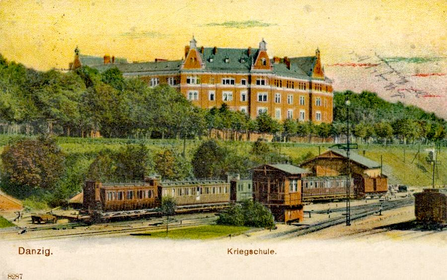 Gdańsk. Szkoła Wojenna przy ul. 3 Maja i nieistniejący dworzec Brama Wyżynna.